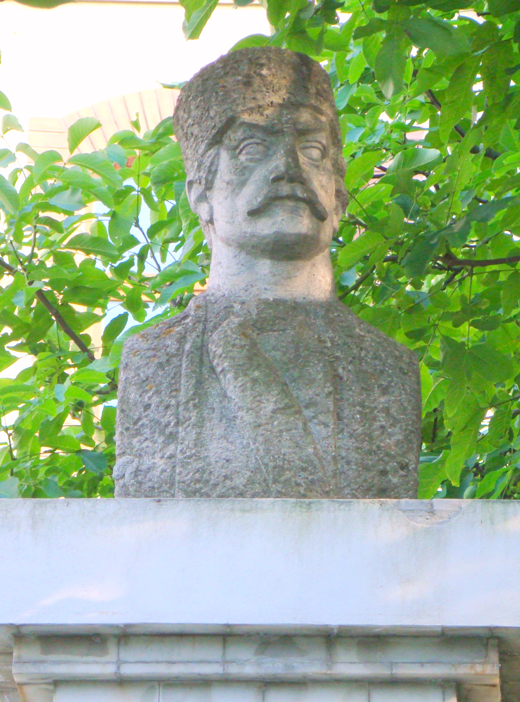 Bustul lui Avram Iancu, municipiul Aiud, Str. Varga Ecaterina 10